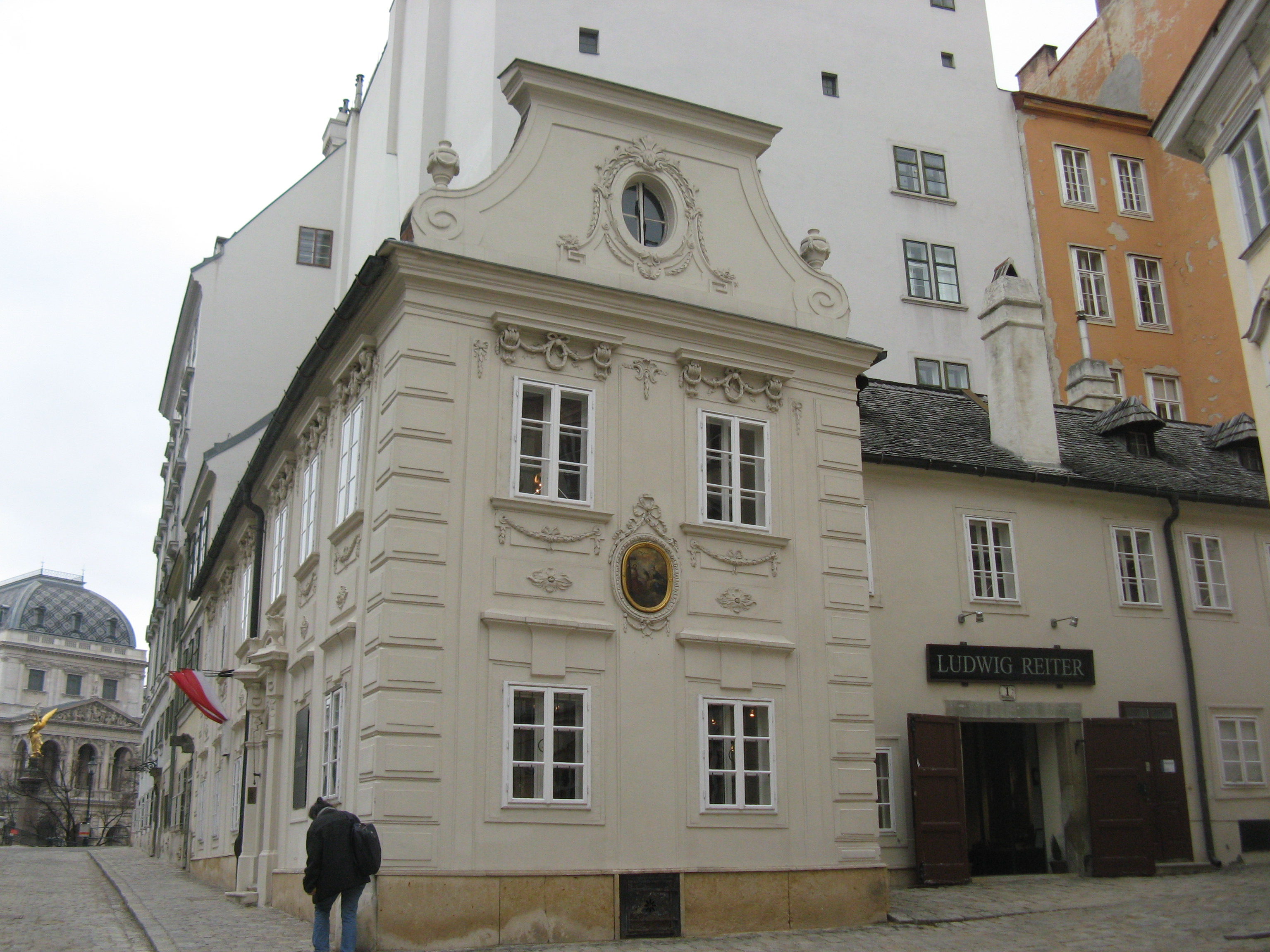 Dreimäderlhaus (3. Viertel 18. Jh.), Schreyvogelgasse 10, Wien-Innere Stadt